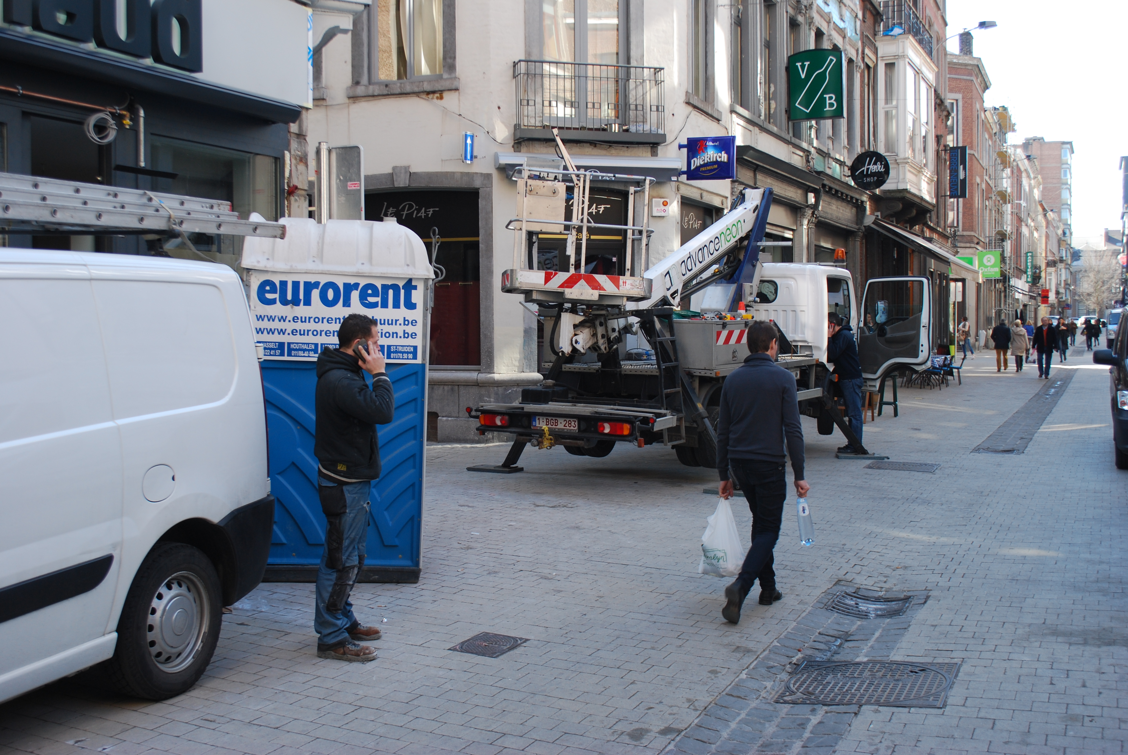 Vue de la rue de la Casquette, à Liège.